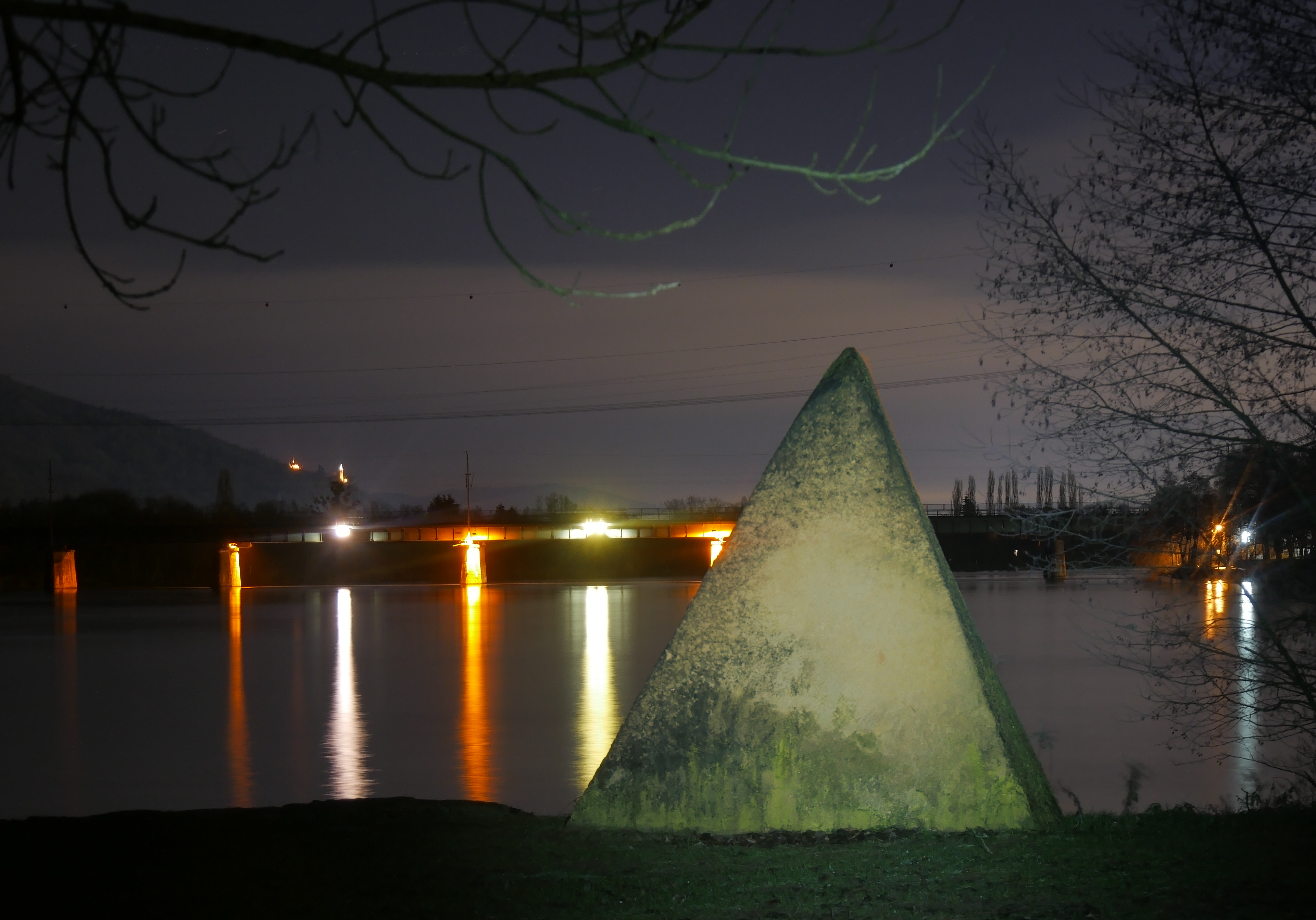 Stein an der Saarmündung von Christoh Mancke 1999. Dreieckier Stein, in dem man sitzen, stehen und zur Ruhe kommen kann. Entstanden im Rahmen des Bildhauersymposiums in Oberbillig 1999 - Im Hintergrund die Konzer Eisenbahnbrücke über die Mosel und ganz oben die Lichter von Markusberg und Mariensäule in Trier